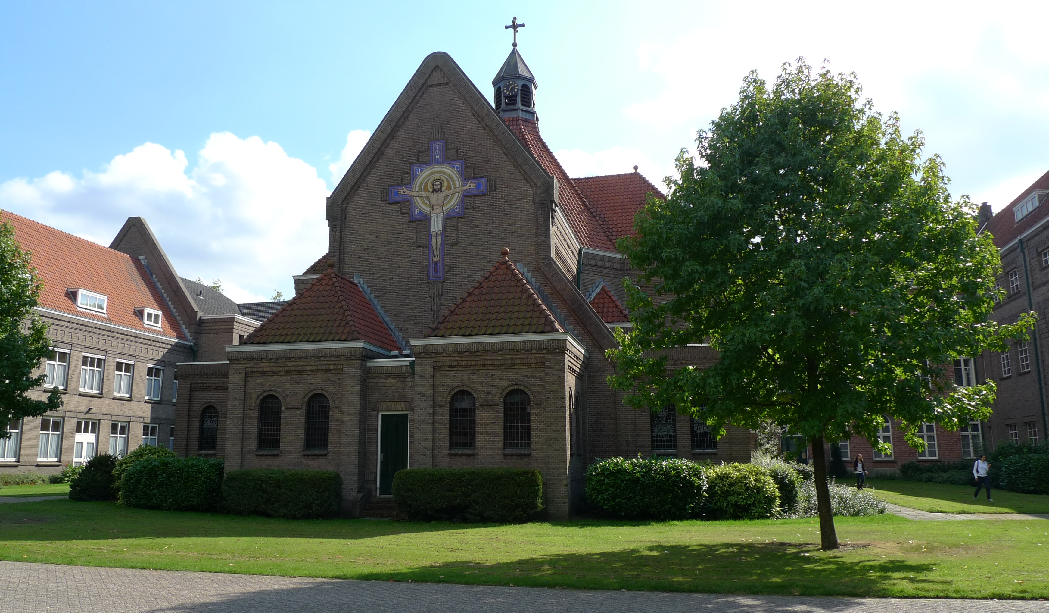 Eikenburg in Eindhoven, Nederlands rijksmonument nr. 518707